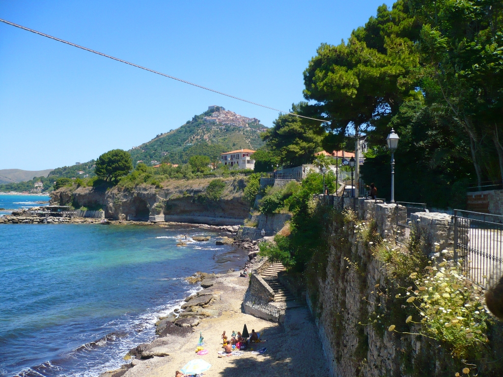 La zona dove è situata, in parte in suoli privati e in parte in suoli pubblici, la necropoli romana di S.Marco di Castellabate (Salerno)con 151 tombe rinvenute